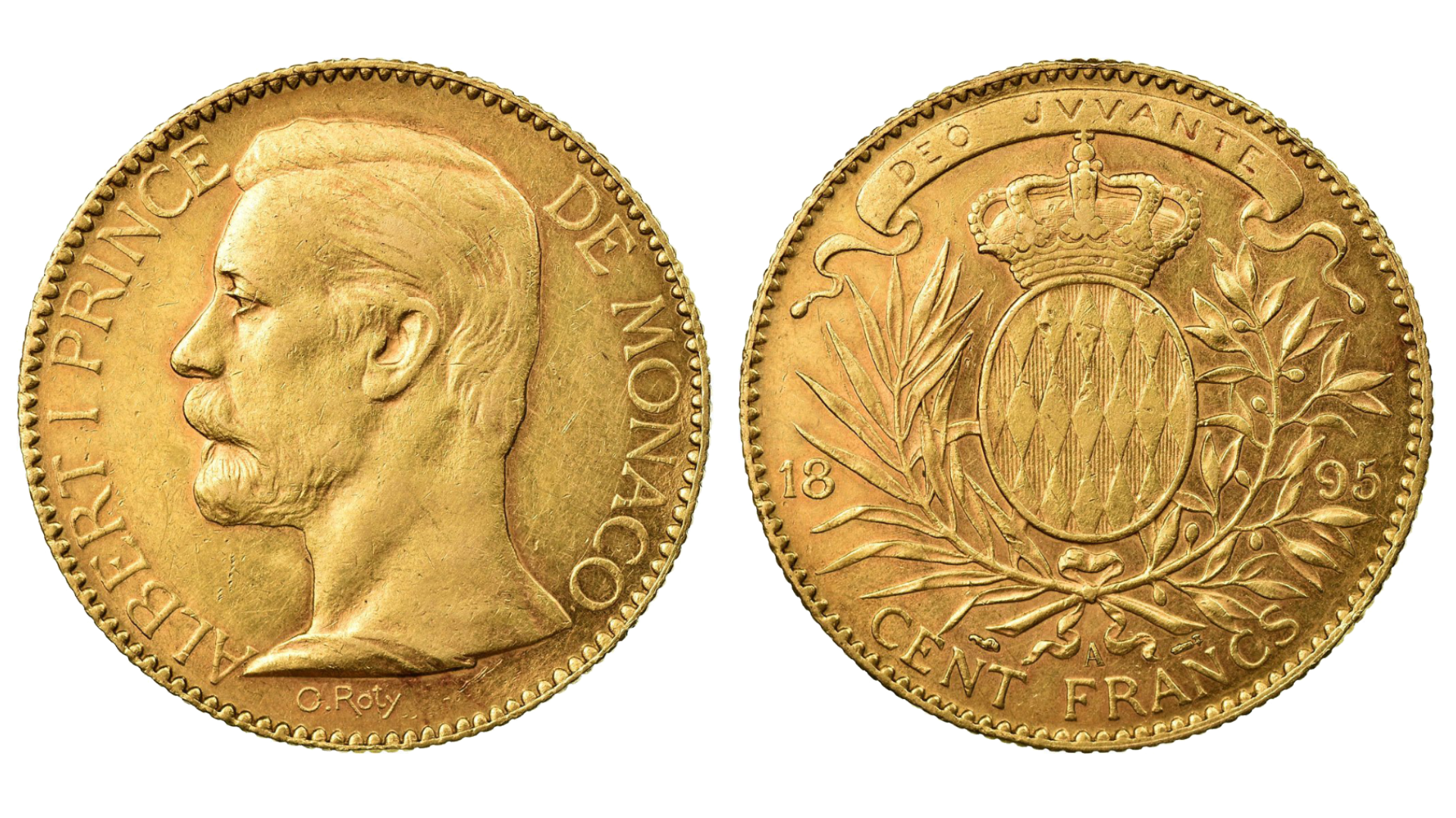 Portrait du prince Albert 1er de Monaco sur l'avers, écu couronné sur le revers; 1895; par O.Roty